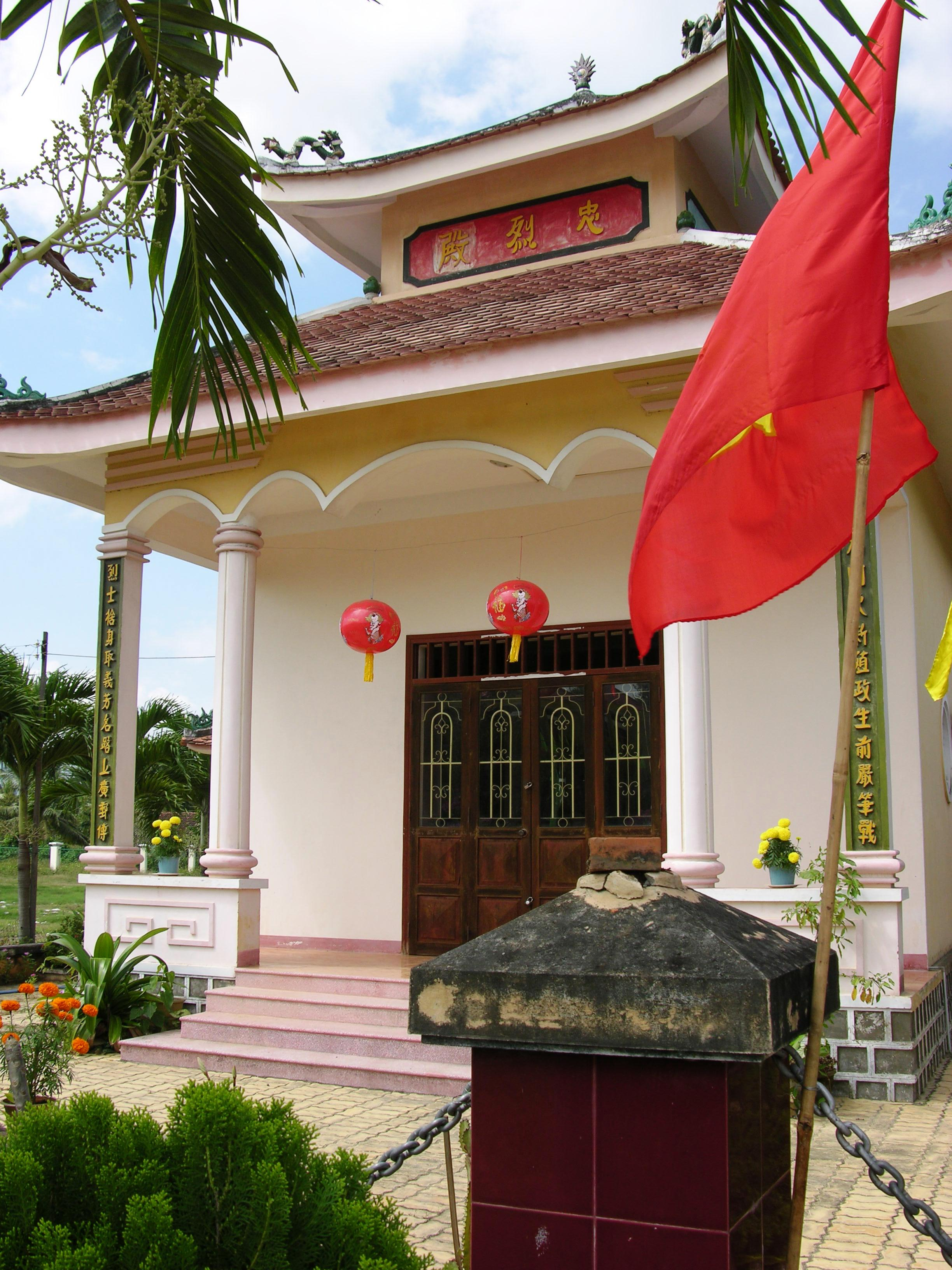 Tran Quy Cap temple in Dien Khanh, Khanh Hoa, Viet Nam